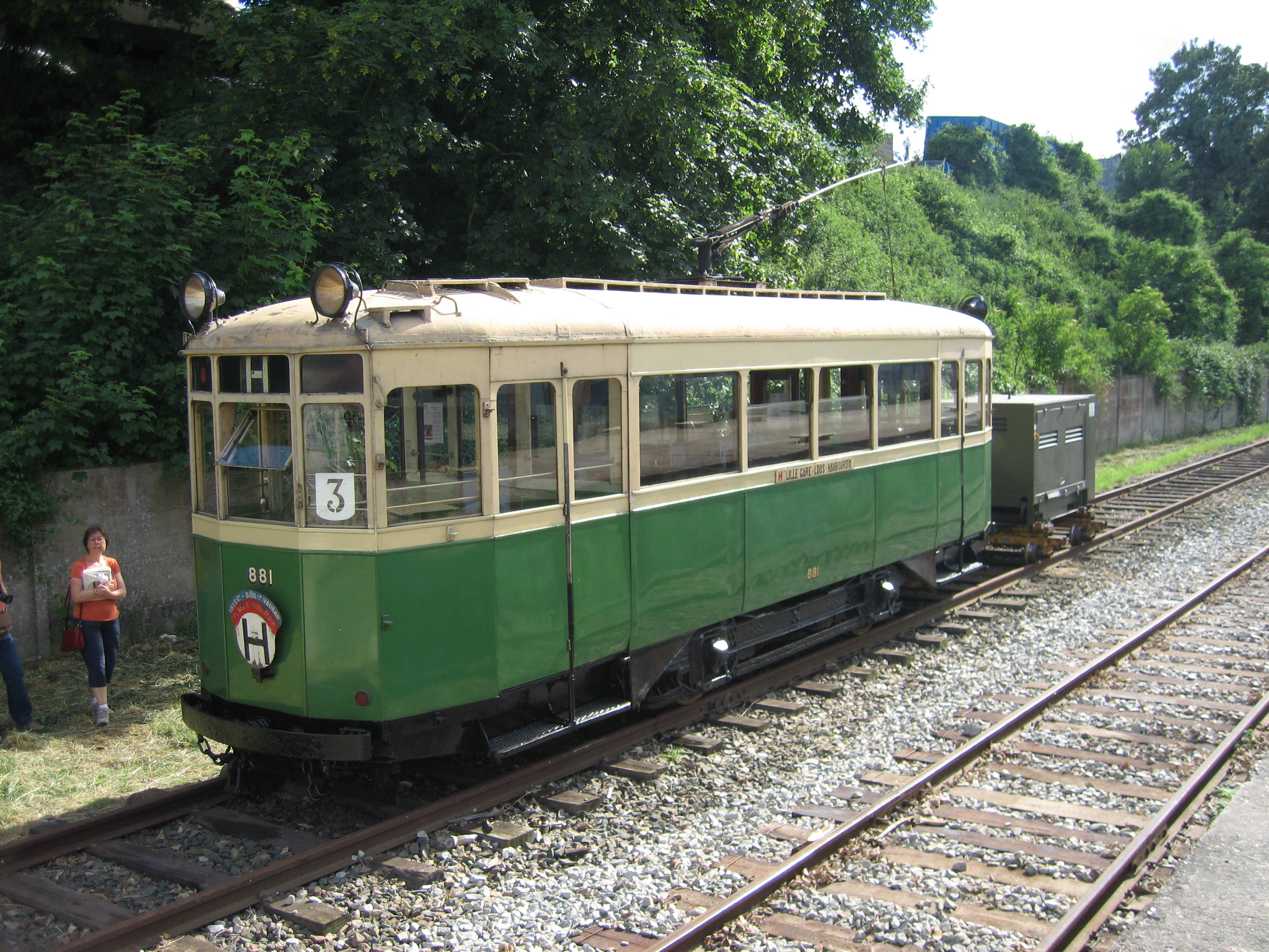 Tramway de Lille autonome au 5e régiment du génie / JPO 13/06/2009